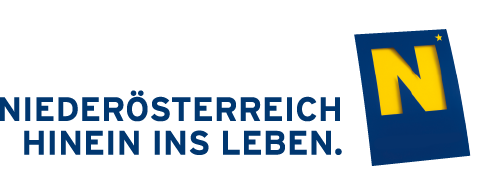 Logo der Niederösterreich-Werbung mit dem Slogan: Hinein ins Leben